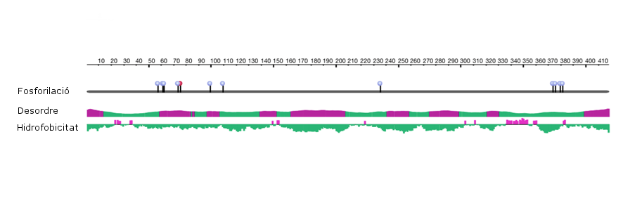 Es poden veure representats la fosforilació, el desordre i la hidrofobicitat.